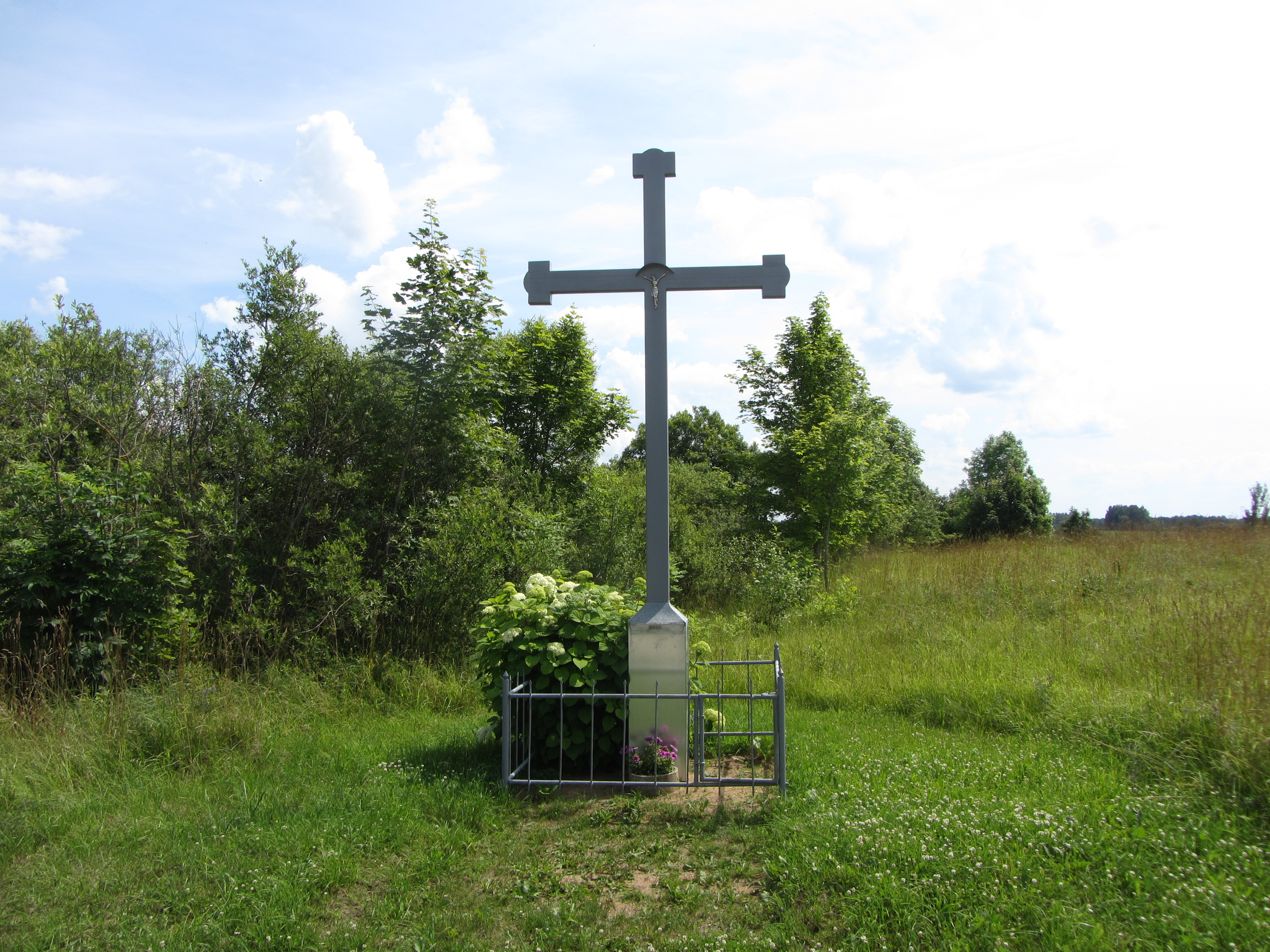 Bieniūnai 30269, Lithuania